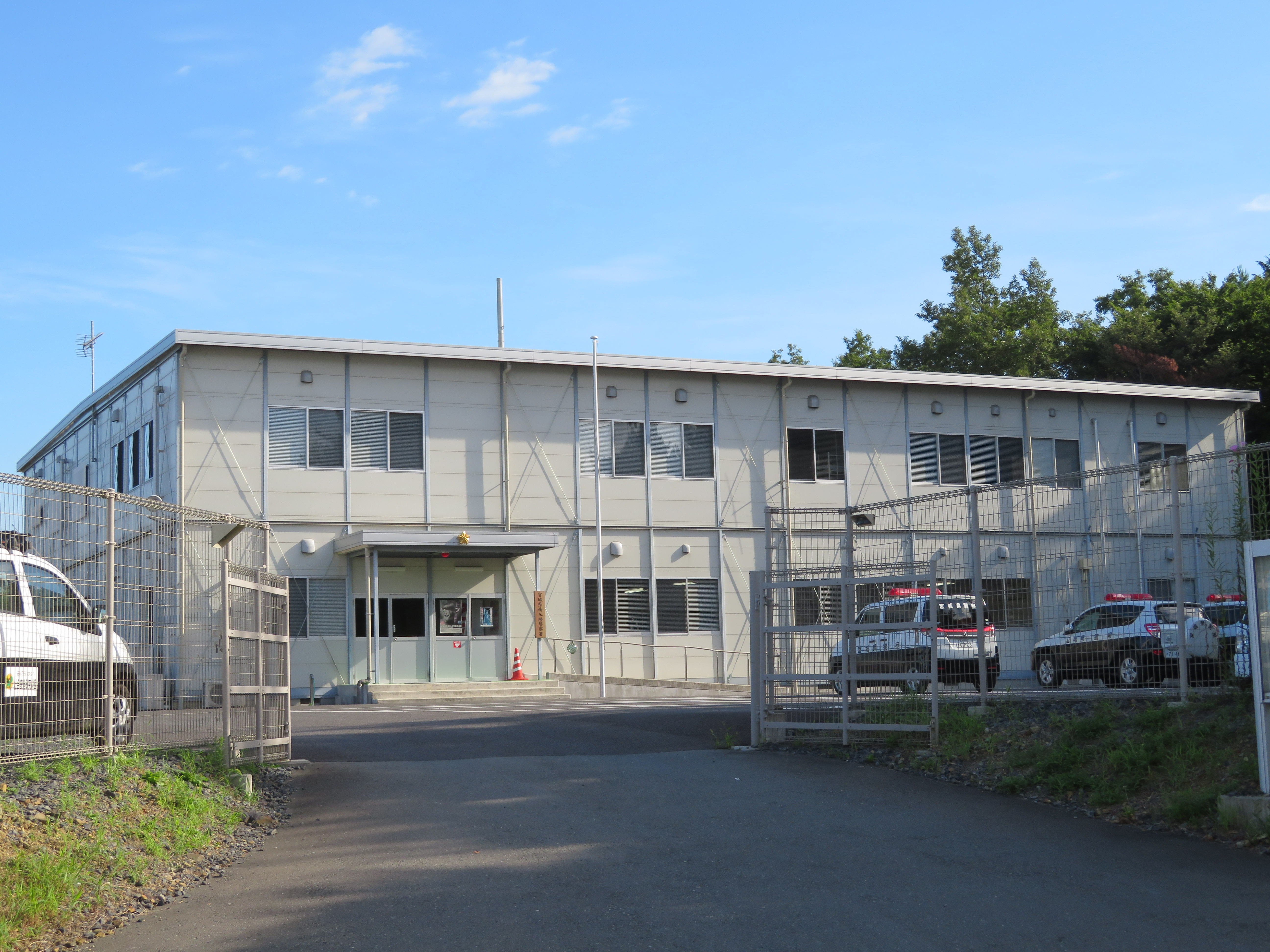 宮城県南三陸警察署（仮庁舎） Canon PowerShot SX720 HS